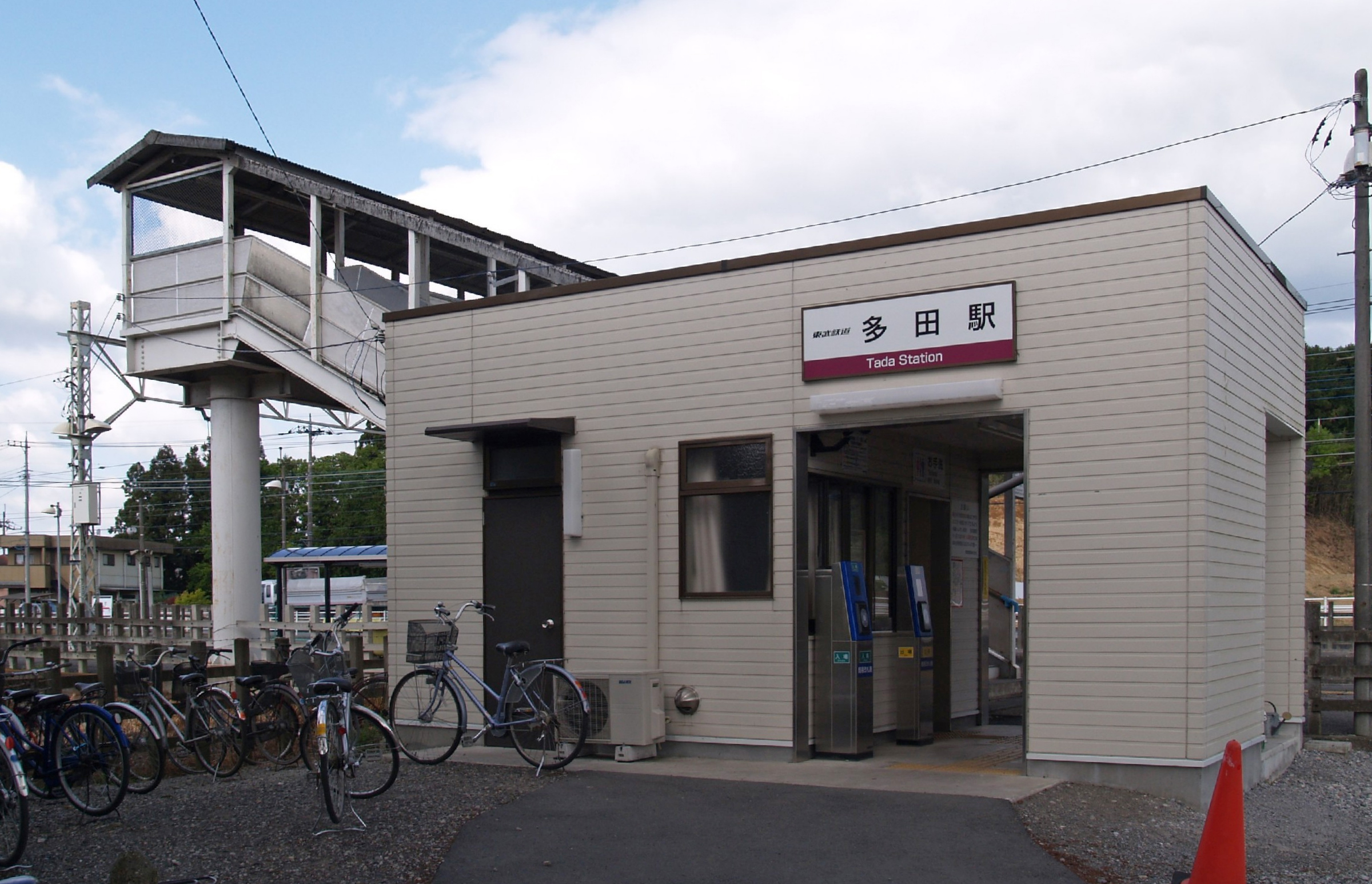 多田駅（東武佐野線）